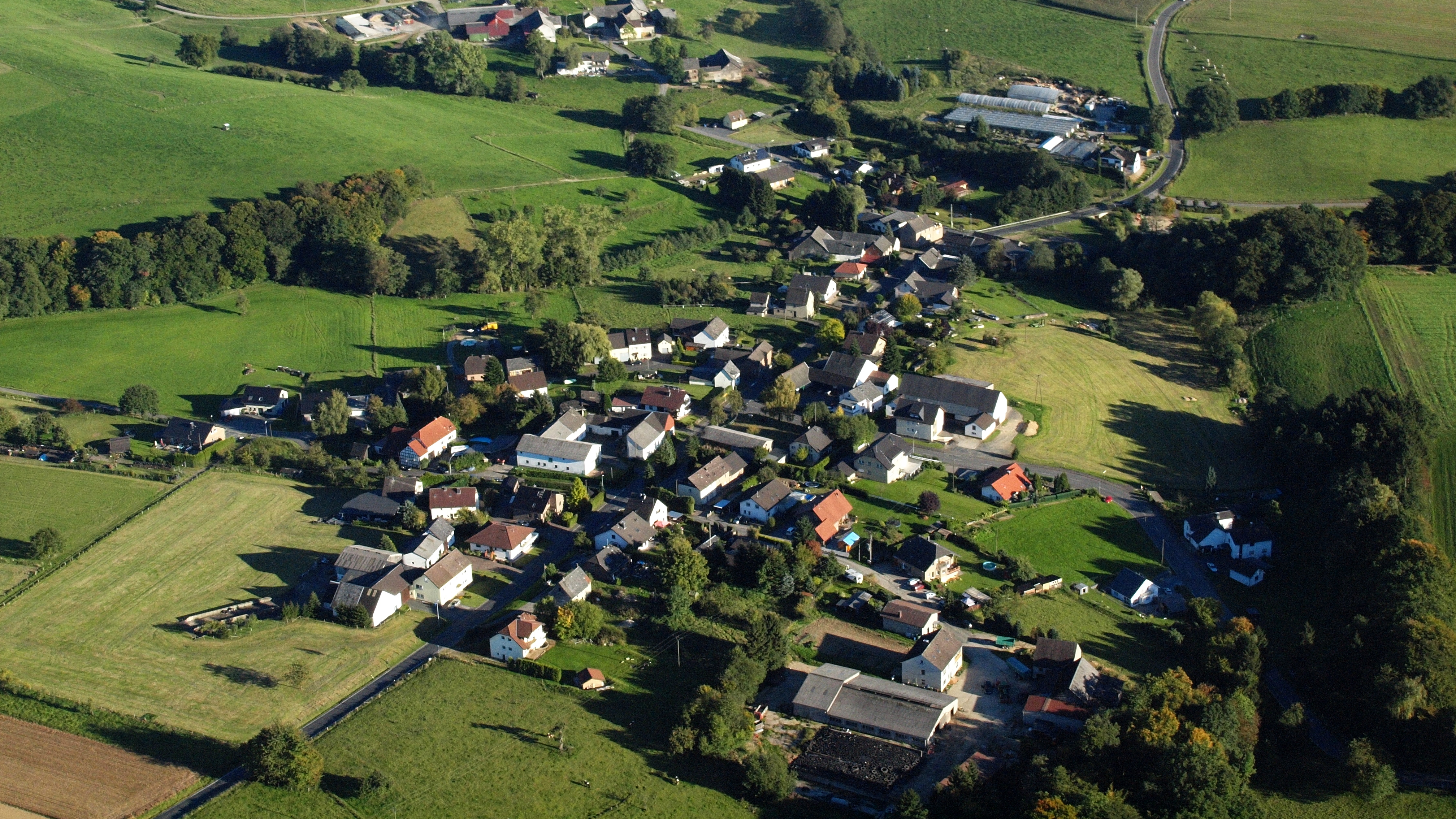 Mendt (Westerwald), Luftaufnahme (2015)